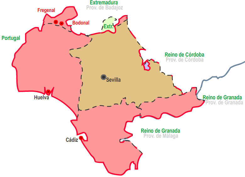 TERRITORIOS Fregenal - Pérdida Grazalema - Incroporación Nuevas Poblaciones de Andalucía y Sierra Morena Reino de Sevilla Reino anterior a 1833 Prov. de Málaga Provincia nueva de 1833 Ext: Extremadura - - - Límite de la provincia __ Límite del antiguo reino